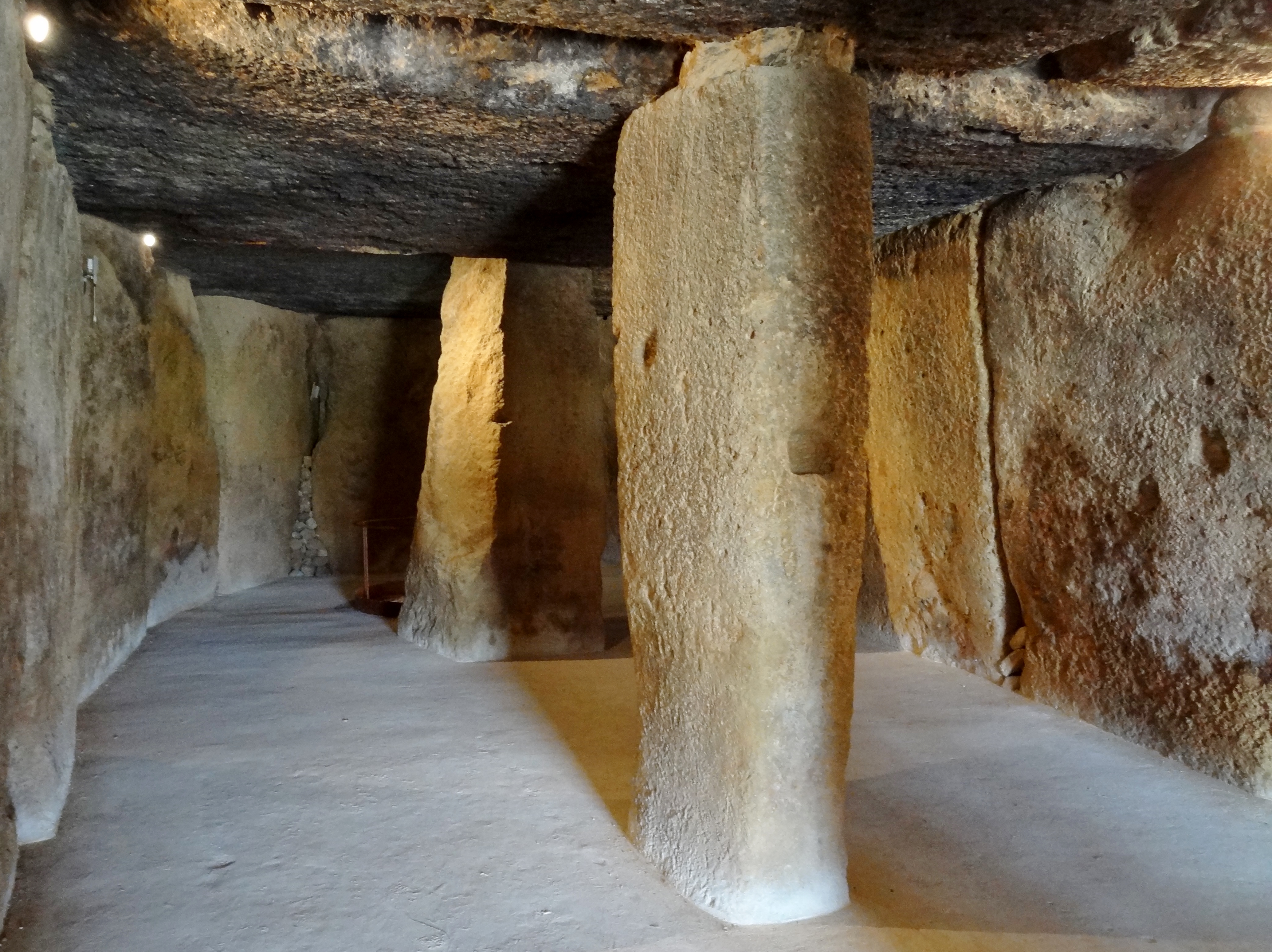 Dolmen de Menga in Antequera, Provinz Málaga, Spanien